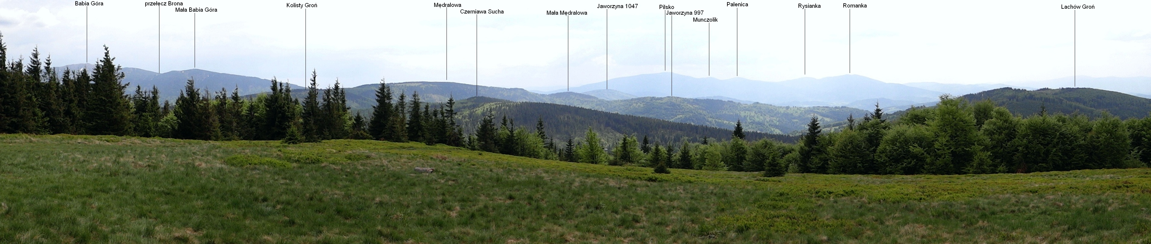 Panorama z Jałowca